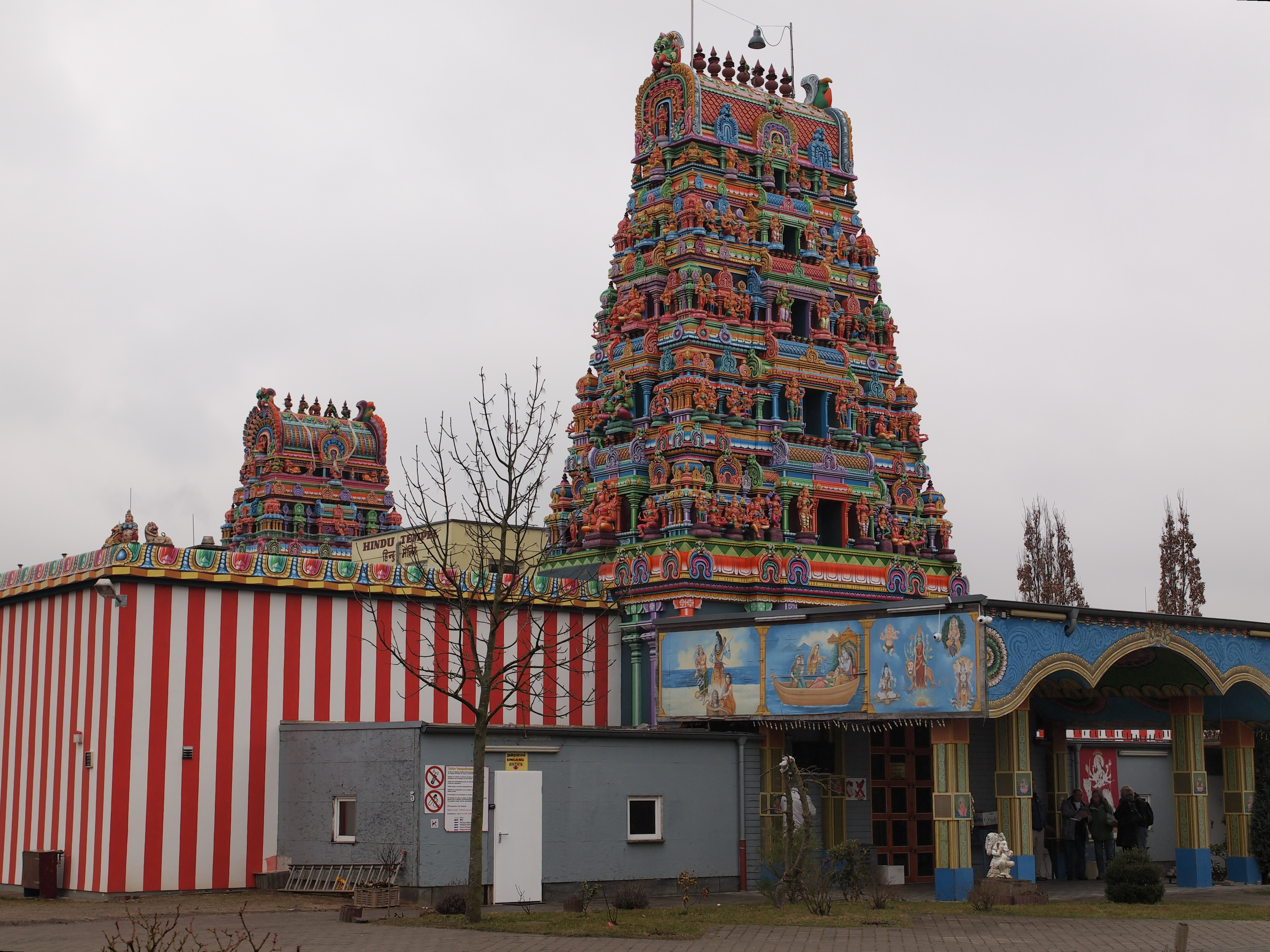 Sri Kamadchi Ampal Tempel in Hamm, Eingangsbereich von Südosten